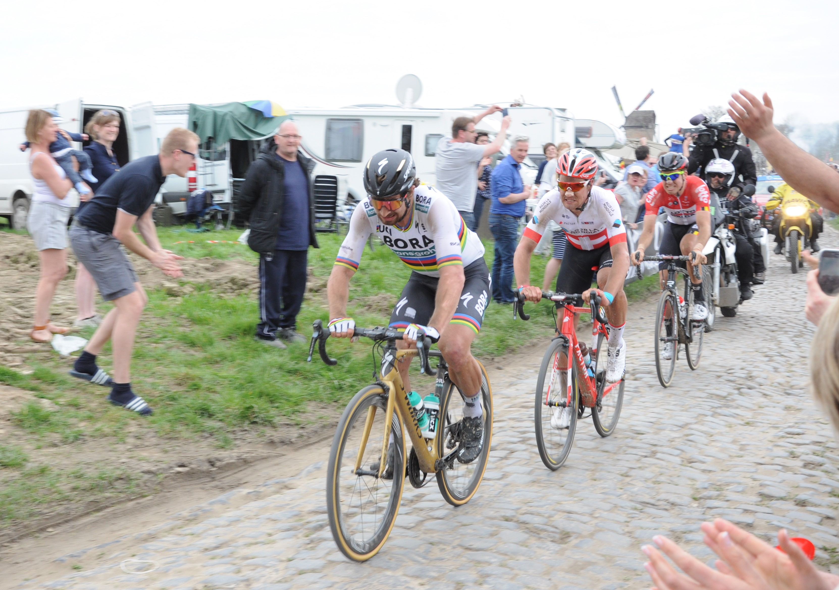 L'échappée de Peter Sagan à Templeuve, à 35 km de l'arrivée - Paris-Roubaix 2018